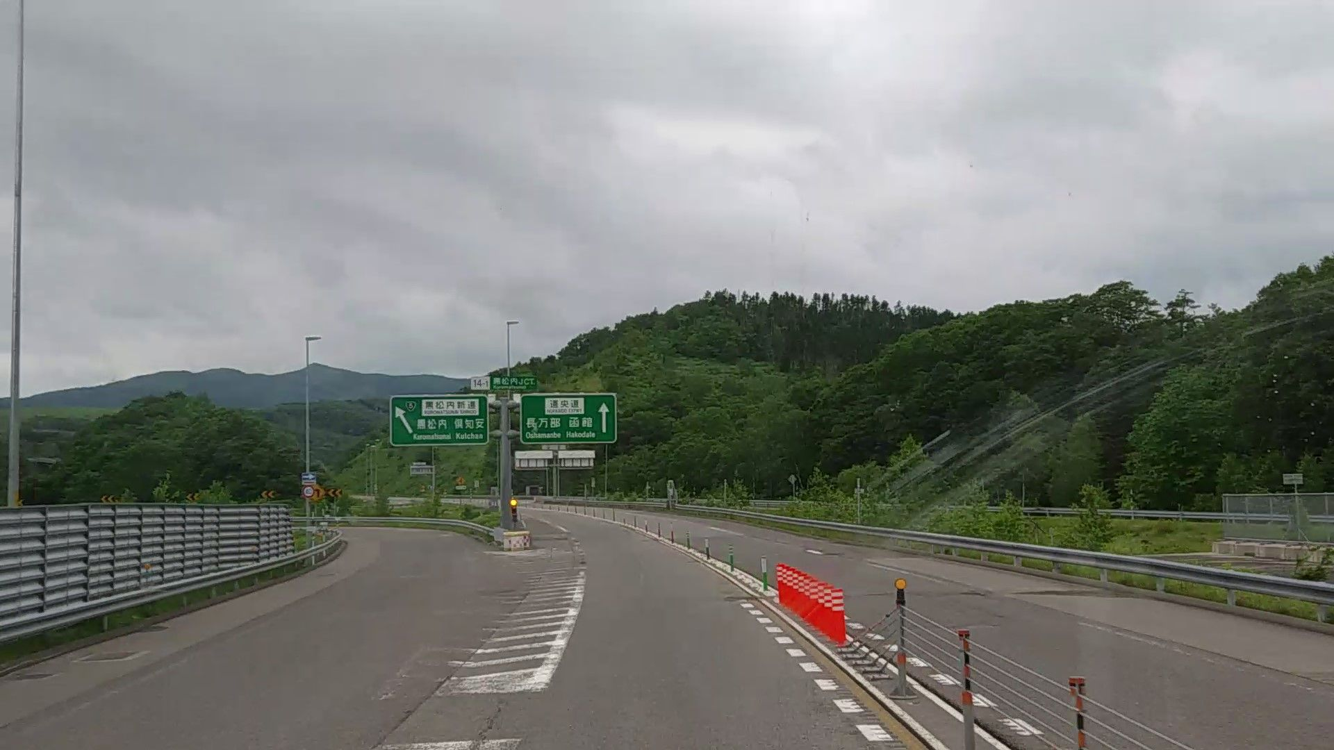 黒松内ジャンクション・分岐部-2（札幌側から、2018年7月撮影）